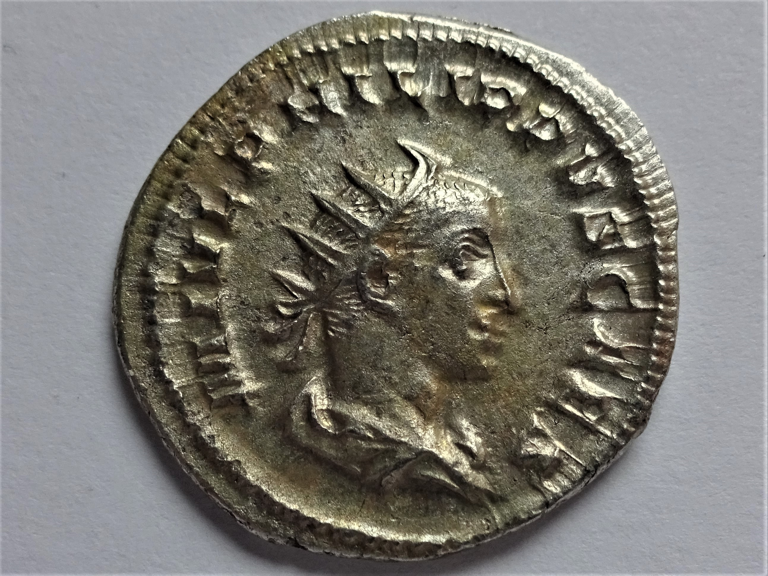 Philippus II auf Antoninian, Kampmann Nr. 76.3